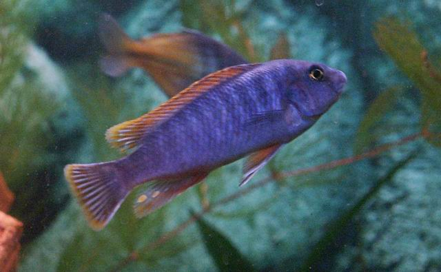 Schabemaubuntbarsch (Labeotropheus fuelleborni)